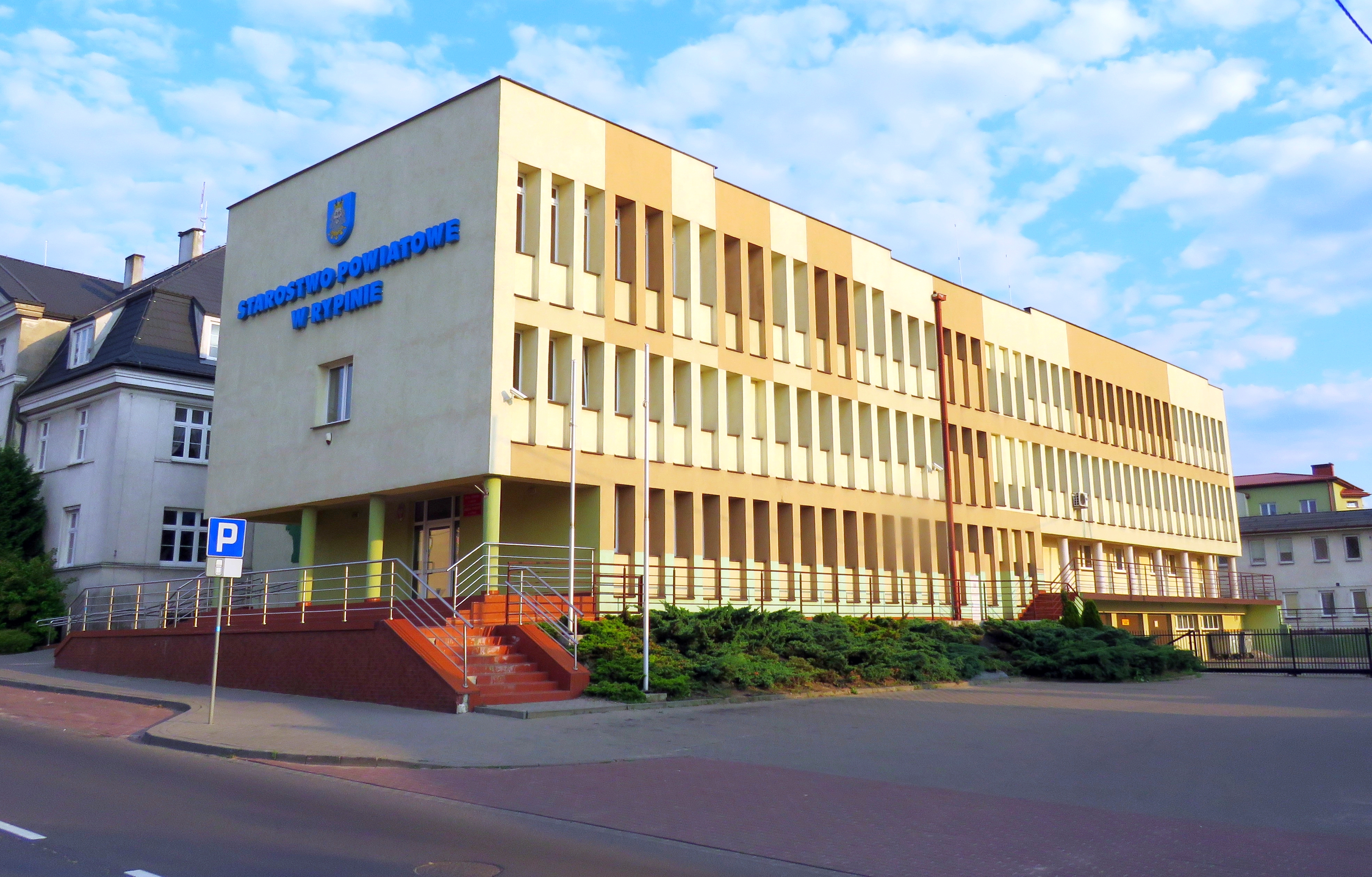 Starostwo Powiatowe